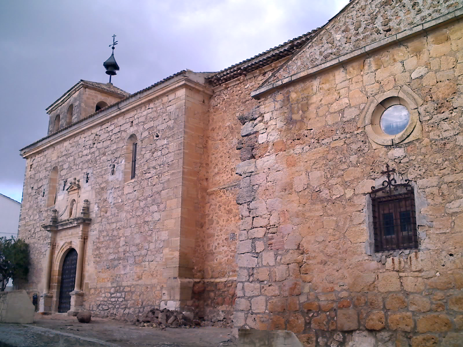 Iglesia de Nuestra Señora de la Asunción en Vellisca (Provincia de Cuenca - España) de estilo románico, construida en el siglo XIV.